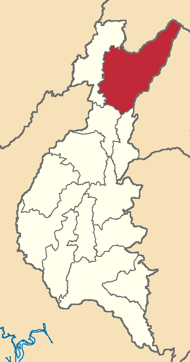 Mapa localizador del cantón en Los Ríos, Ecuador